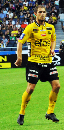 Joackim Jørgensen